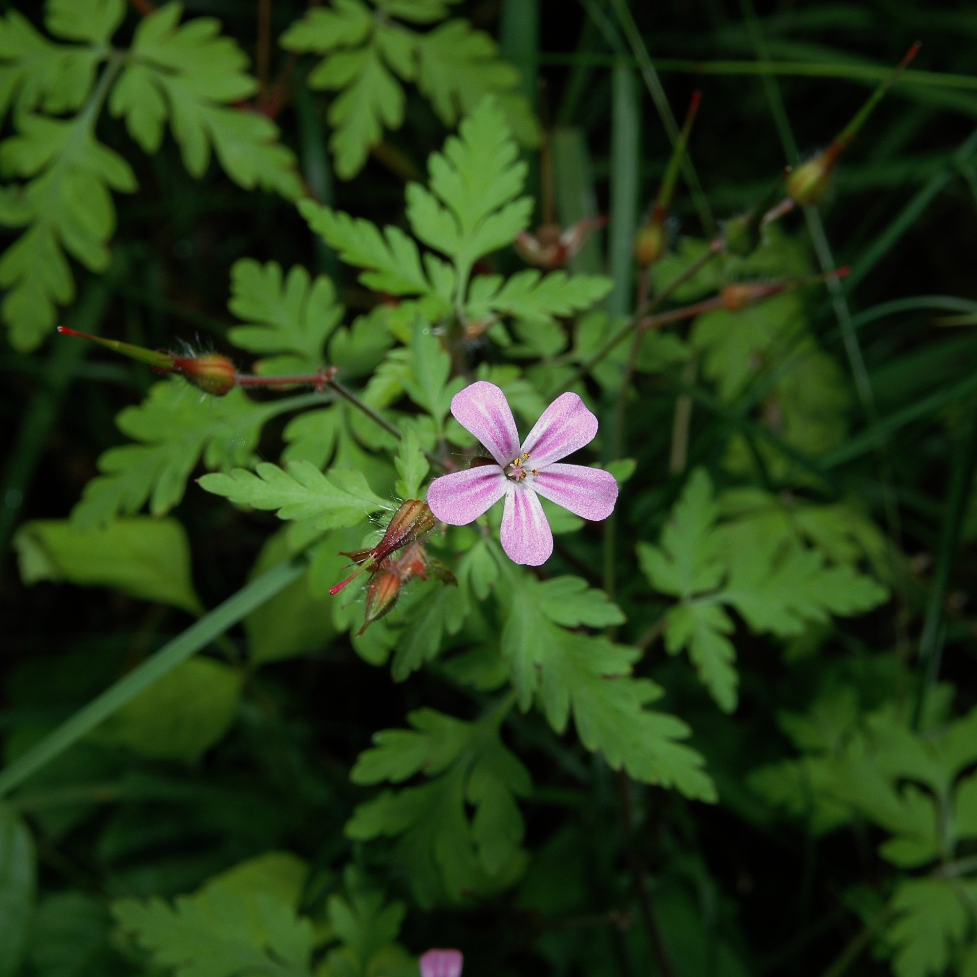 Geranium robertianum in Västerås